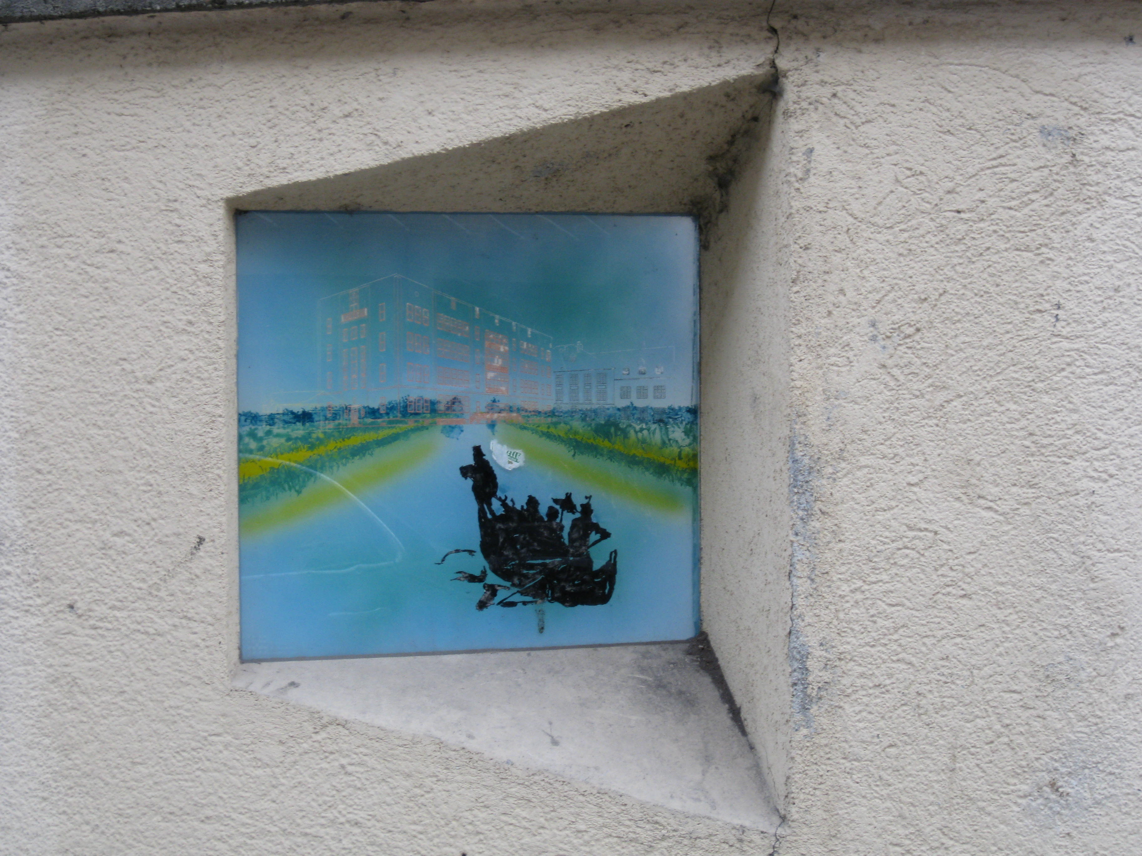 Eine von fünf Tafel, die in der Münchener Schellingstrasse (unweit der Kreuzung mit der Türkenstraße) an den Türkengraben erinnern. Der Name der Münchener Türkenstraße geht auf den Türkengraben zurück. Siehe Nordmünchner Kanalsystem